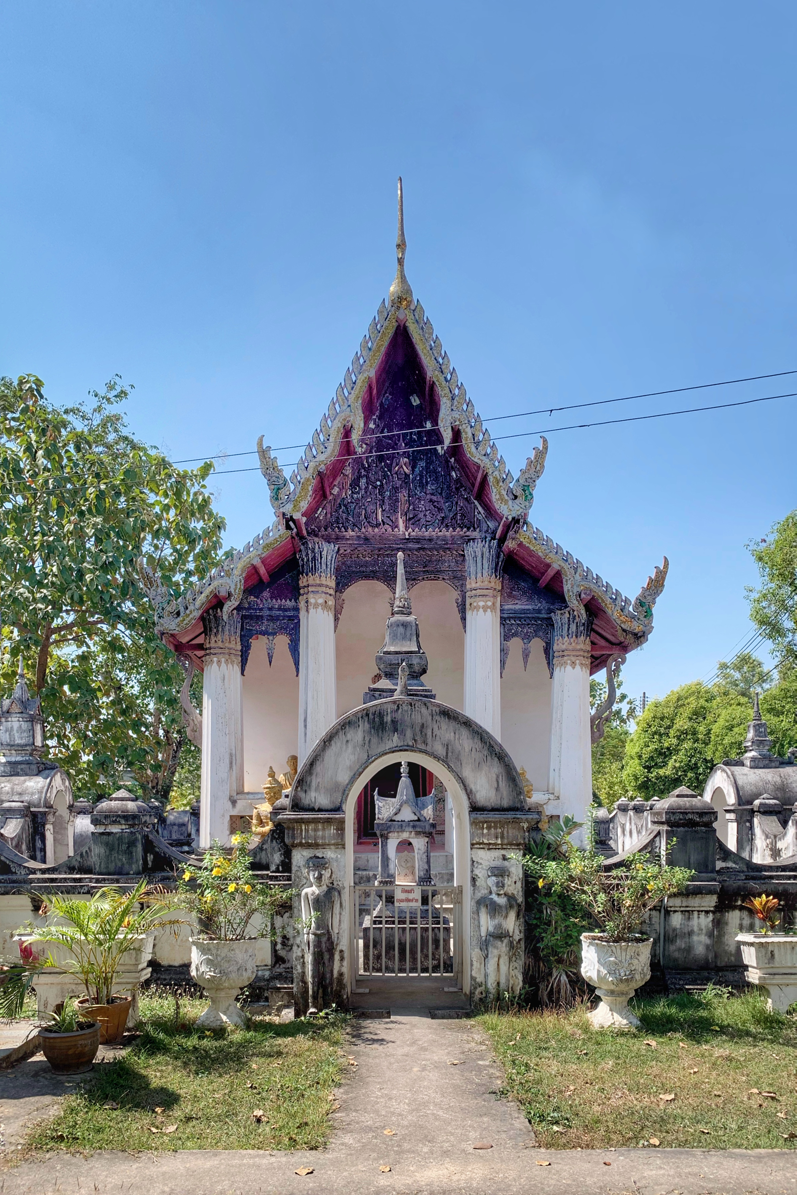 วัดใหญ่ทักขิณาราม นครนายก